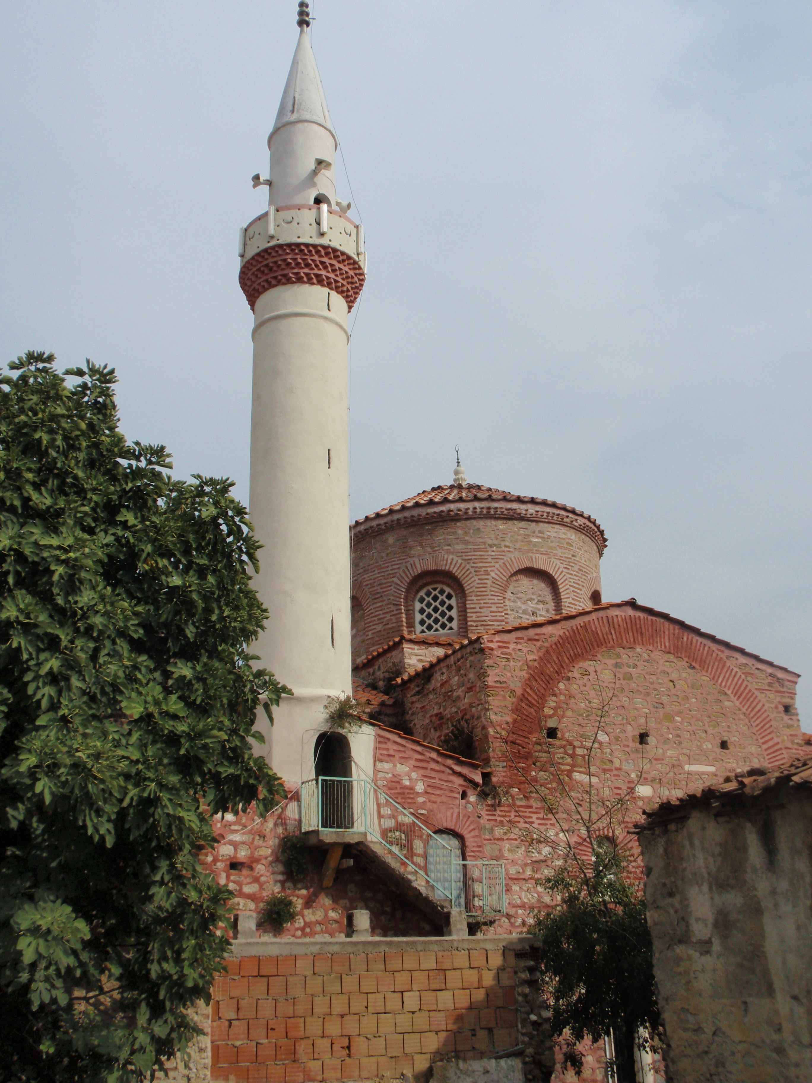 Fatihte bir Cami, bir kiliseden camiye çevrilmiştir, Zeytinbağı